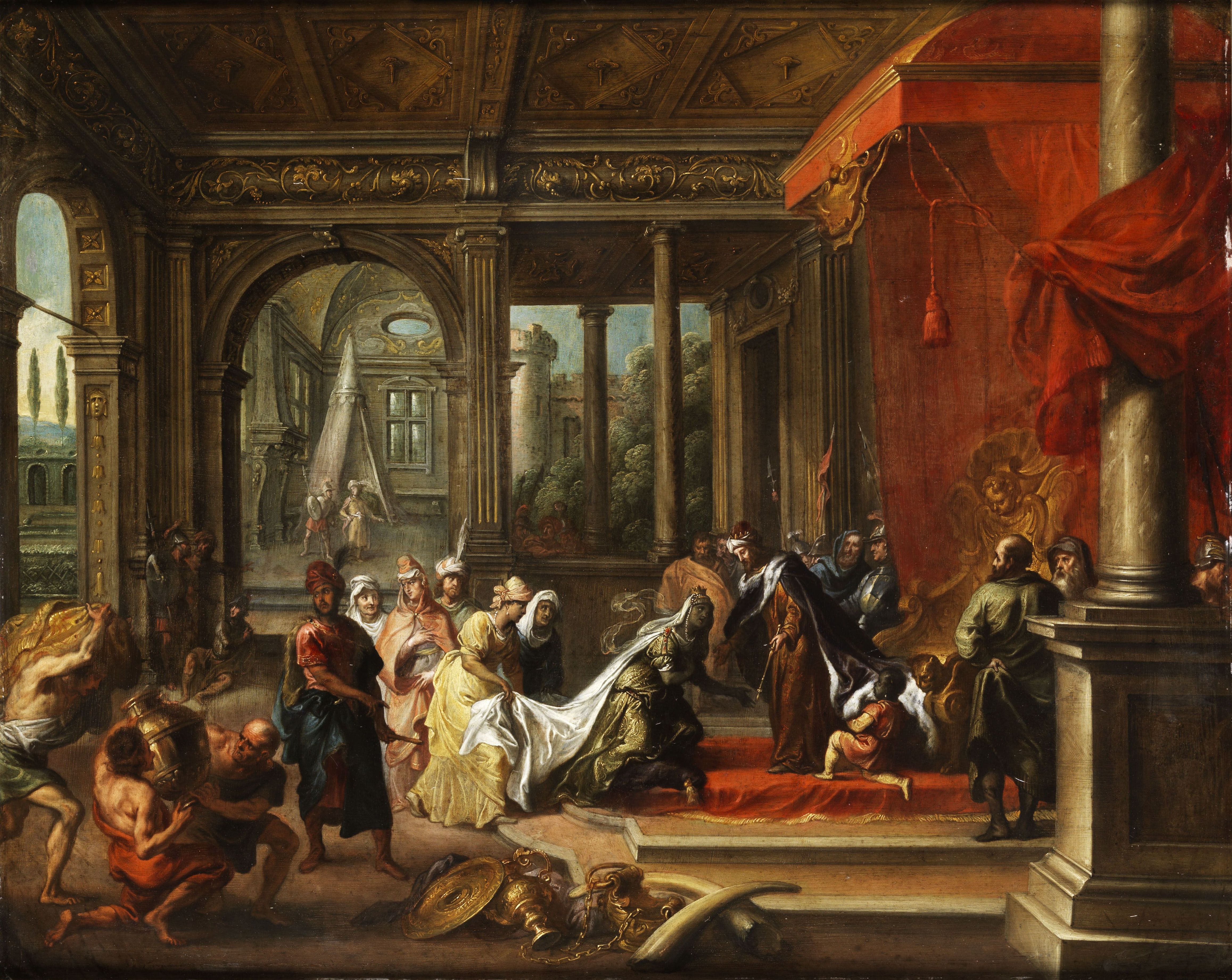 König Salomon empfängt die Königin von Saba. Maler der Antwerpener Schule des 17. Jahrhunderts, Öl auf Kupfer. 70 x 88 cm.